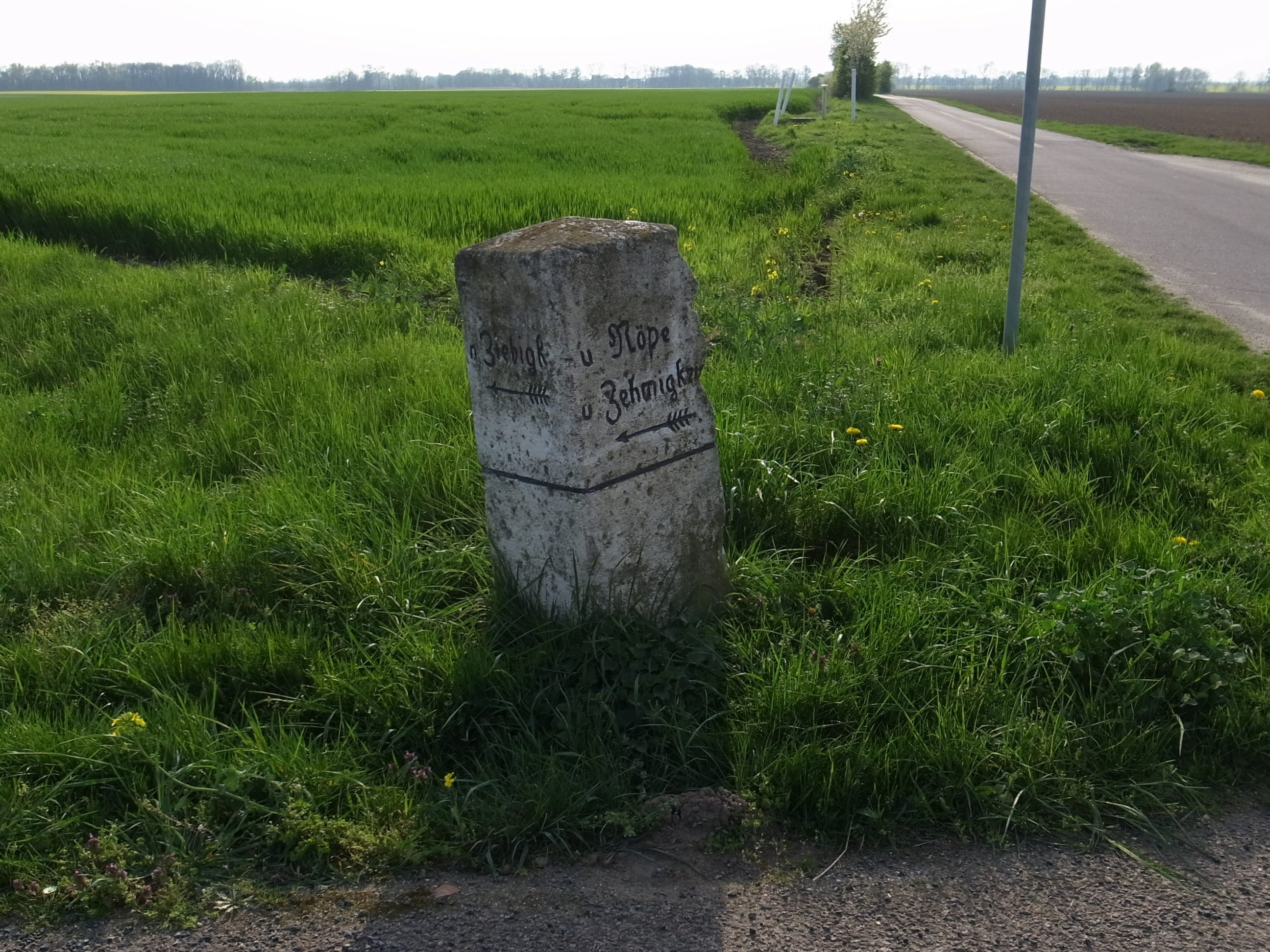 Meilendorf, Wegweiser. Inschrift: n Ziebigk - u Nöpe ; u Zehmigkau (Anmerkung: ein vorbeikommender Anwohner berichtete, dass der Stein umgefahren und nur der obere Teil wieder aufgestellt wurde. Den Ort Nöpe kannte er nicht, dieser steht auch in keiner Karte oder Messtischblatt)